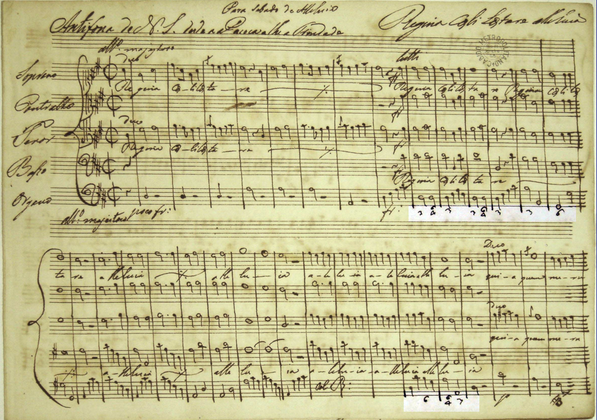 Abertura da Antífona de Nossa Senhora para o Tempo Pascoal em ré maior. As partes em realce indicam o baixo cifrado.